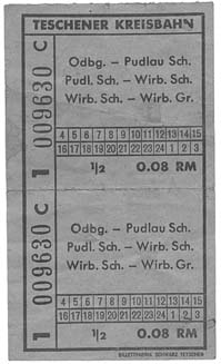 Česky: Jízdenka na Bohumínskou tramvajovou dopravu z období 2. sv. války.